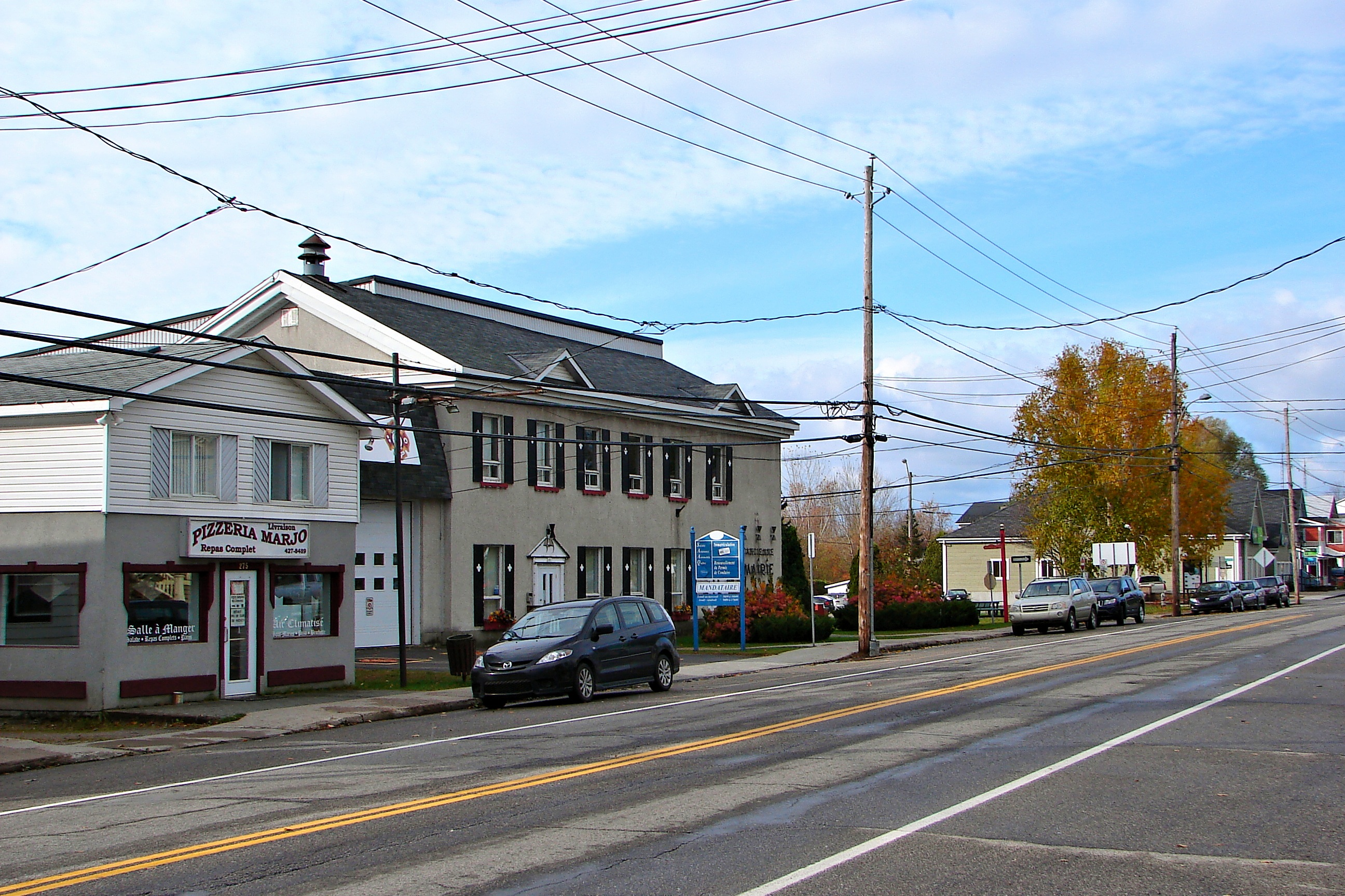 Papineauville, Quebec, Canada